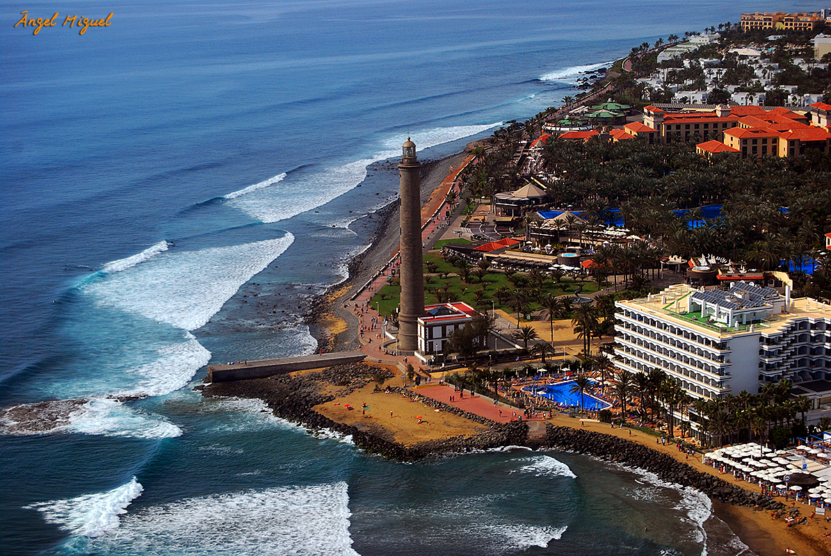 Volando por encima de las Dunas de Maspalomas en la isla de Gran Canaria (Islas Canarias)